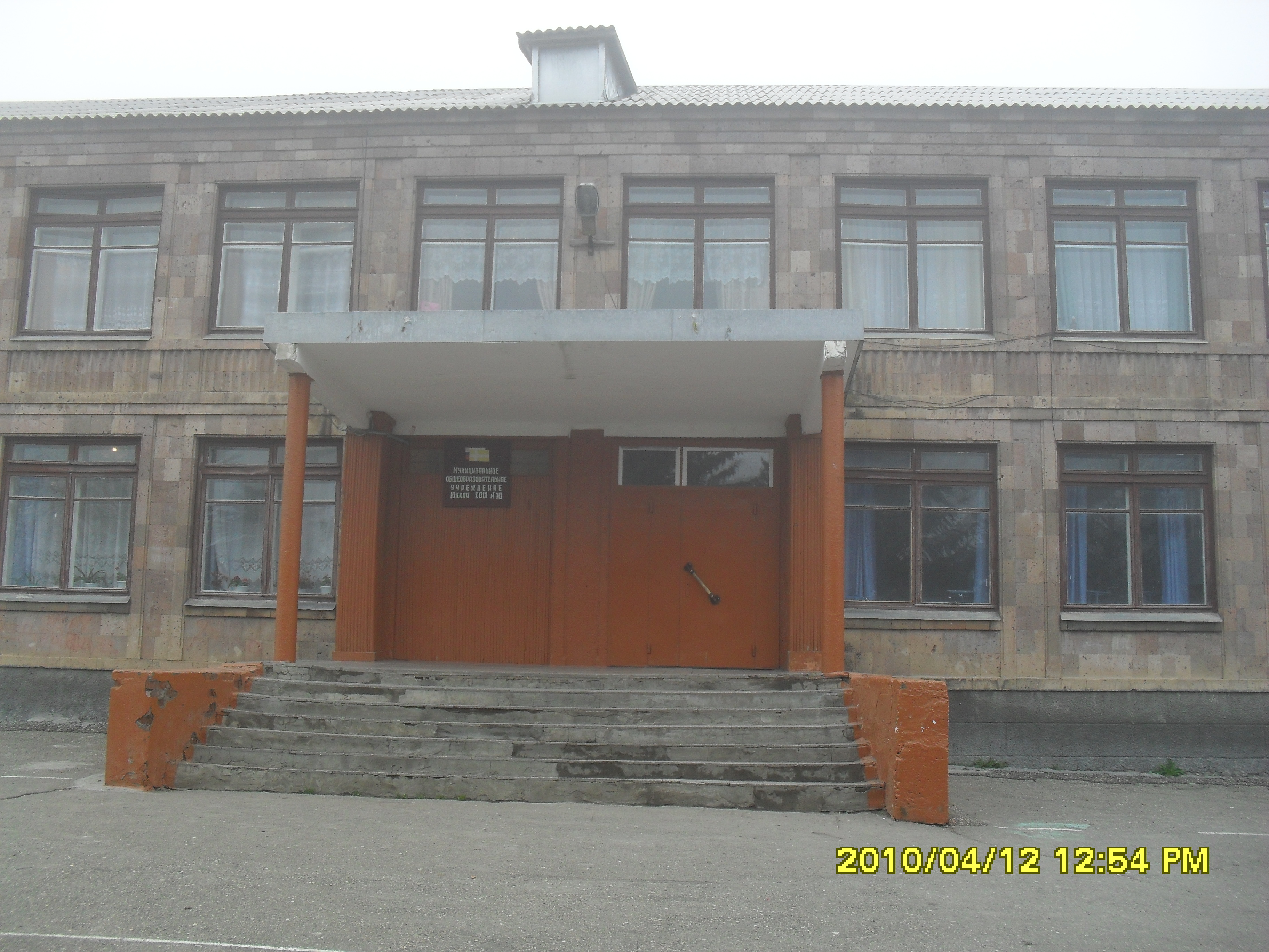 Школа №10 села Юца